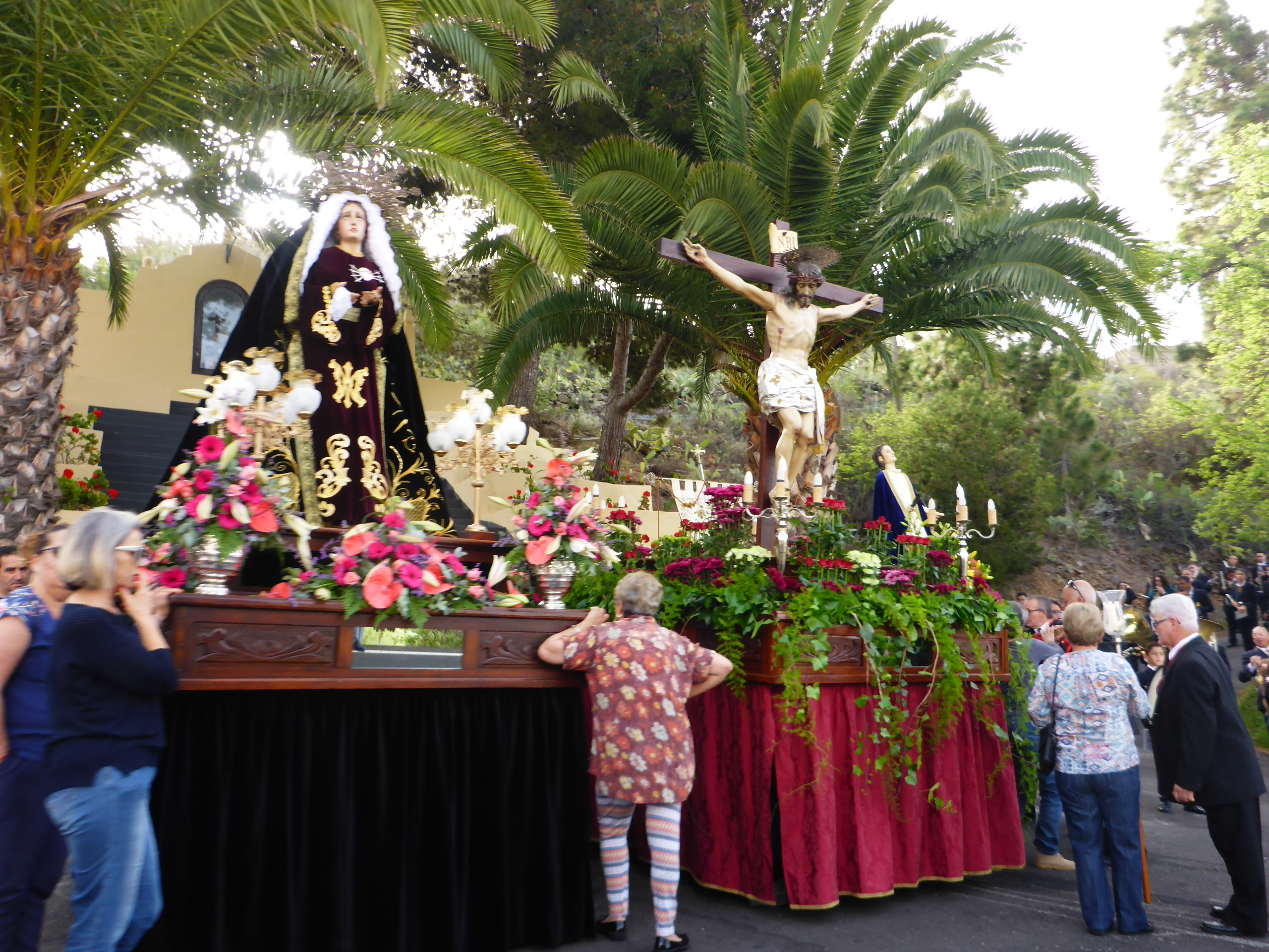 Procesión del Viernes Santo en Chio, Tenerife